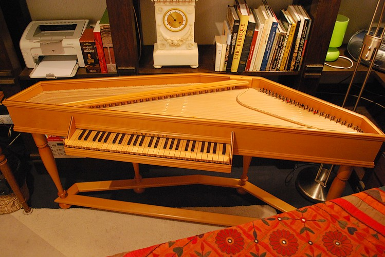 Virginal italien de la Maison Neupert (D) : copie d'un virginal vénitien de Benedetto Floriani (fin du XVI° siècle: cyprès, cèdre).